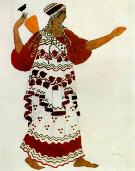 Эскиз костюма нимфы к балету «Послеполуденный отдых фавна». 1911